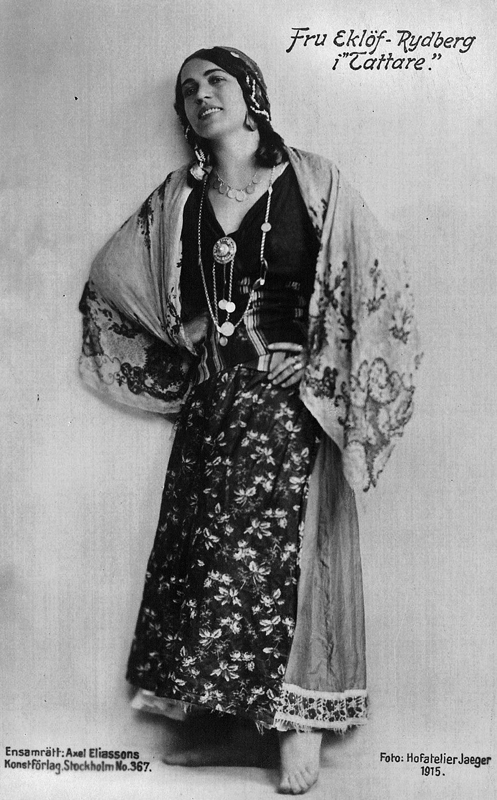 Signe Eklöf i Tattare